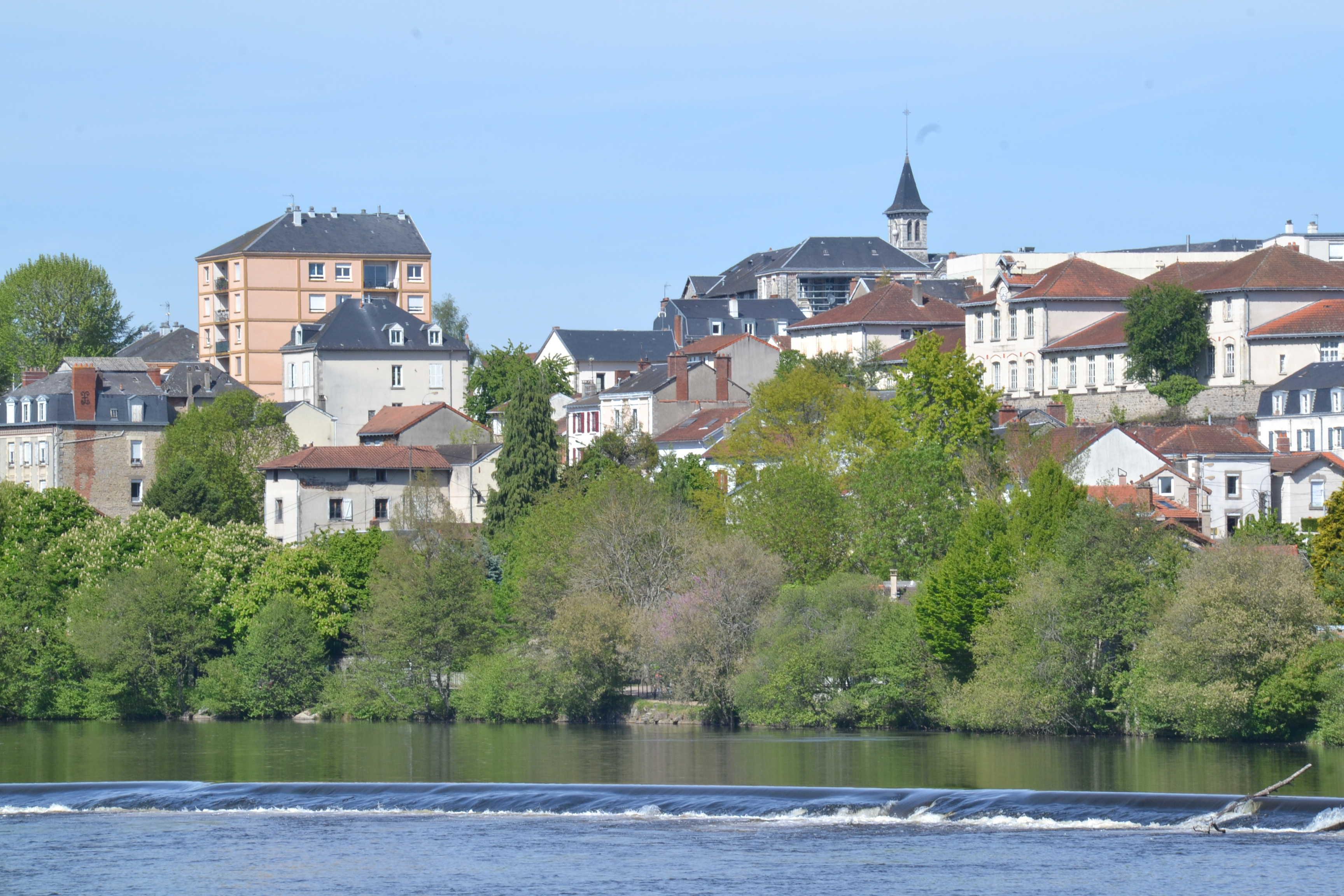 Vue du quartier des Ponts - secteur du Sablard, Limoges (Haute-Vienne, France).